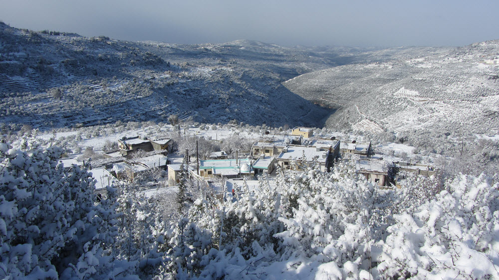 منظر طبيعي